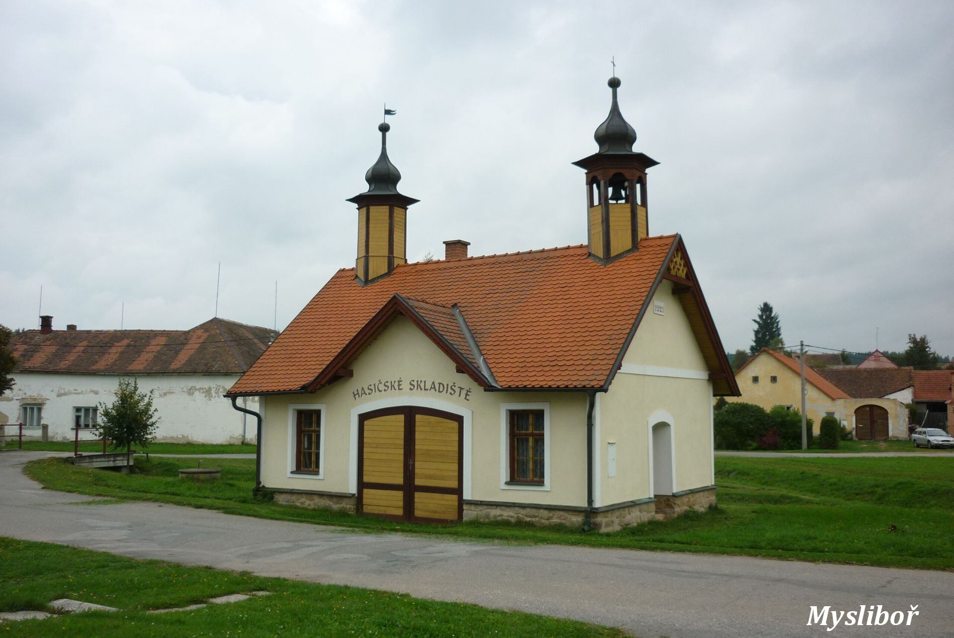 Mysliboř - hasičská zbrojnice